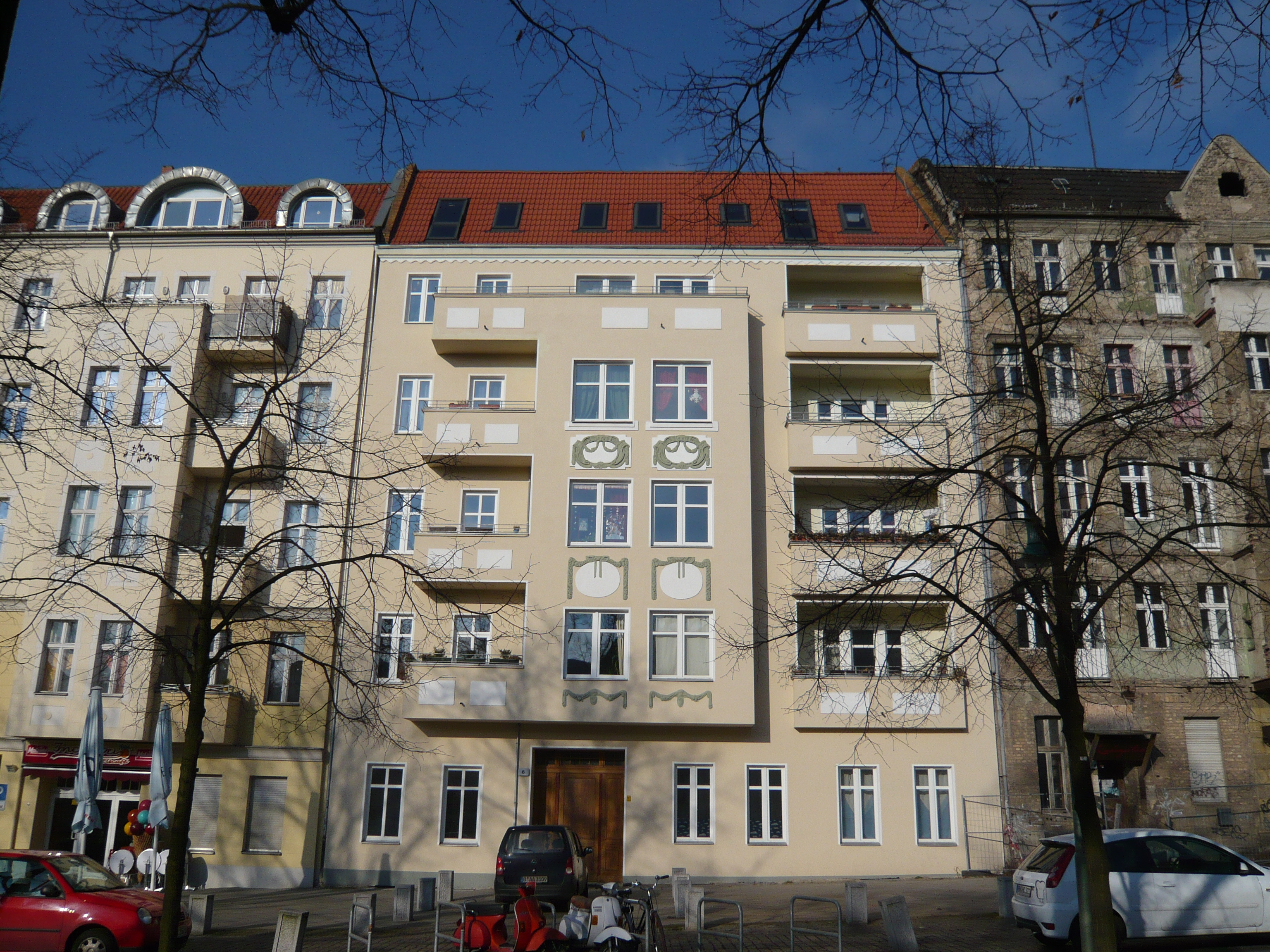 Schleidenplatz im Winter: renoviertes Bürgerhaus